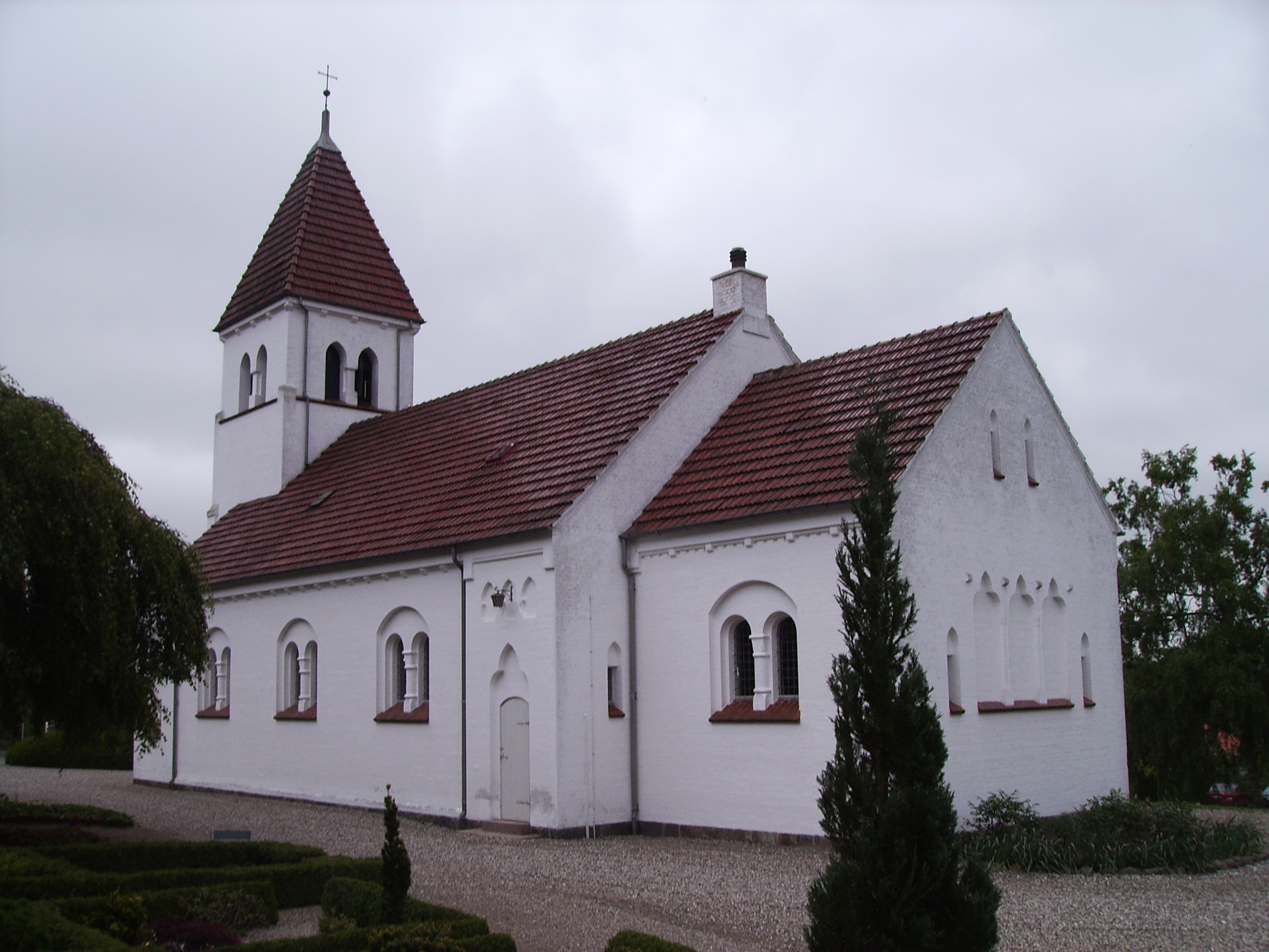 Broholm Kirke, Broholm Sogn, Odense Herred, Odense Amt, Denmark (Danish Church) - Broholm Kirke fra nordvest